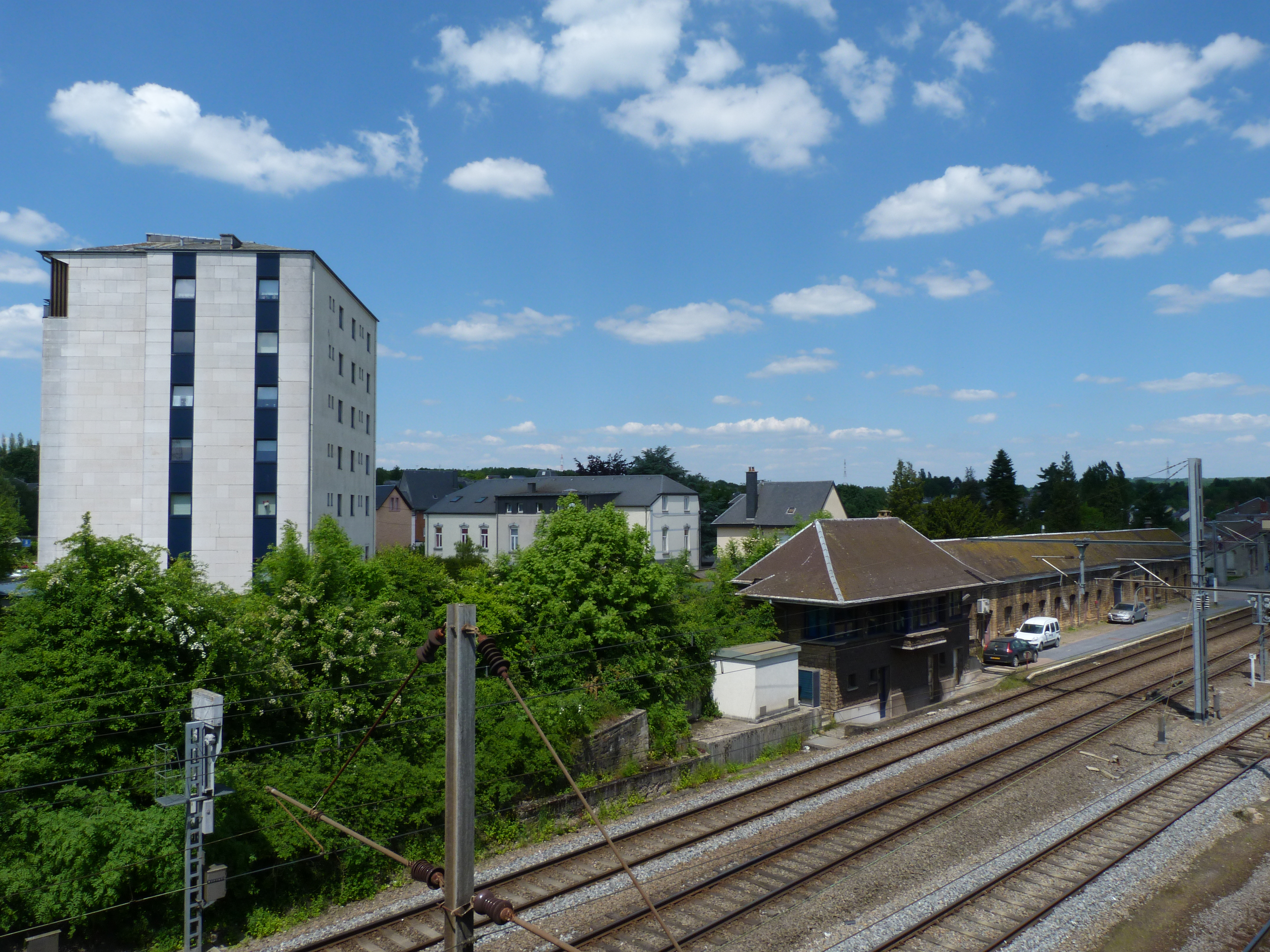 La partie avant de la gare d'Athus (services techniques de la SNCB) et l'immeuble Schwarz.